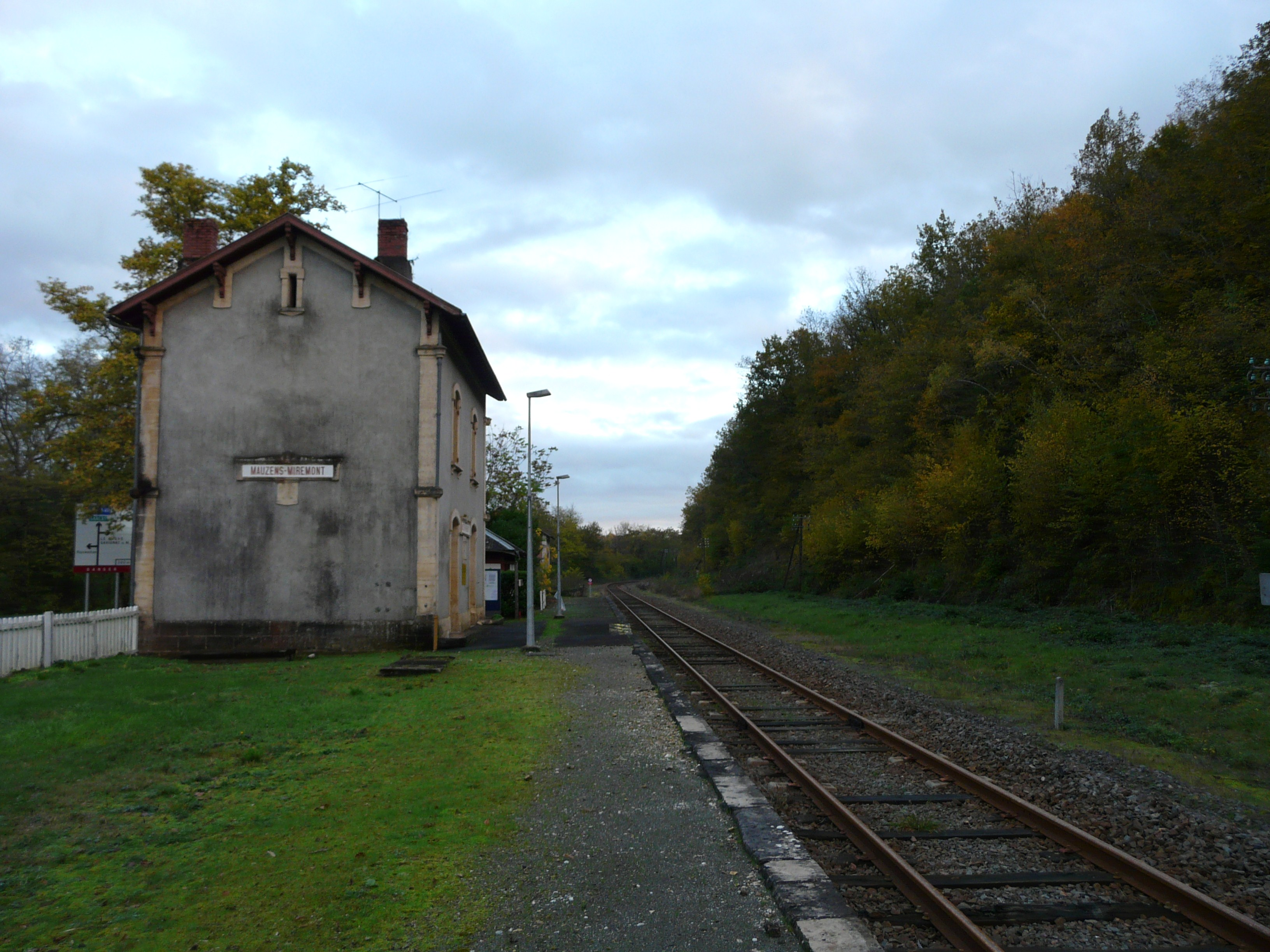 La voie en direction d'Agen, gare de Mauzens-Miremont, Mauzens-et-Miremont, Dordogne, France.